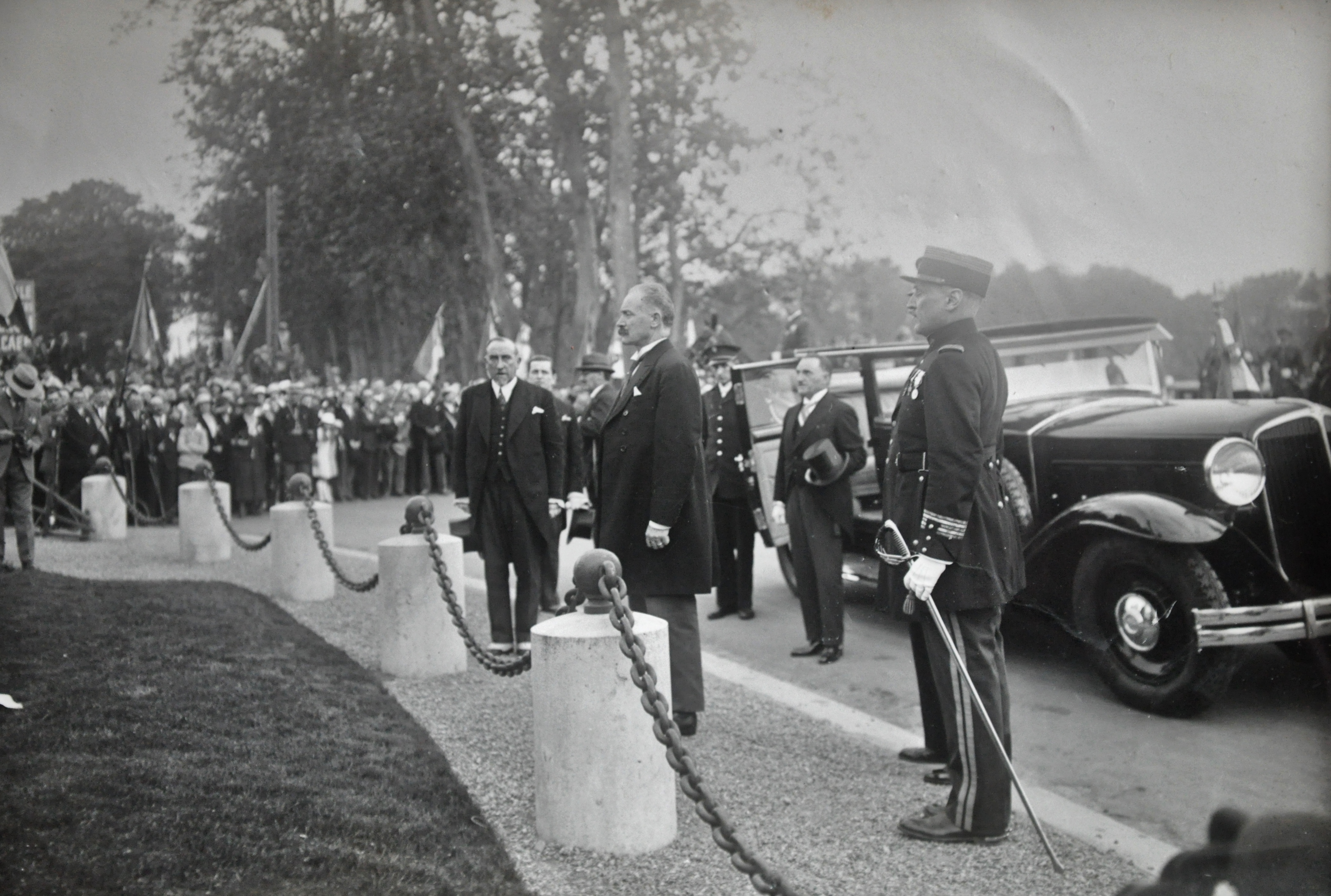 1932 : Visite officielle du président Albert Lebrun, André Détolle en arrière plan à gauche de la voiture.